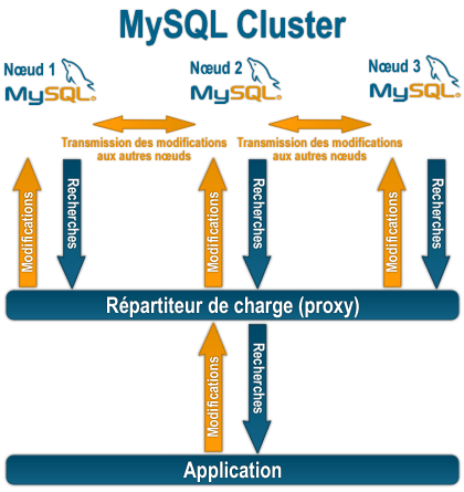 Mise en place d'un Cluster MySQL